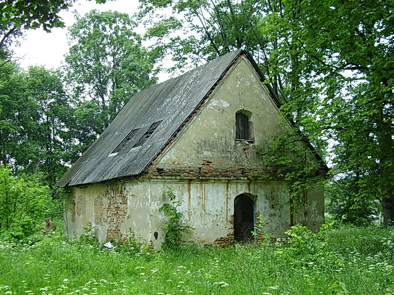 Вялікія Круговічы. Сядзіба. Капліца-пахавальня Абуховічаў